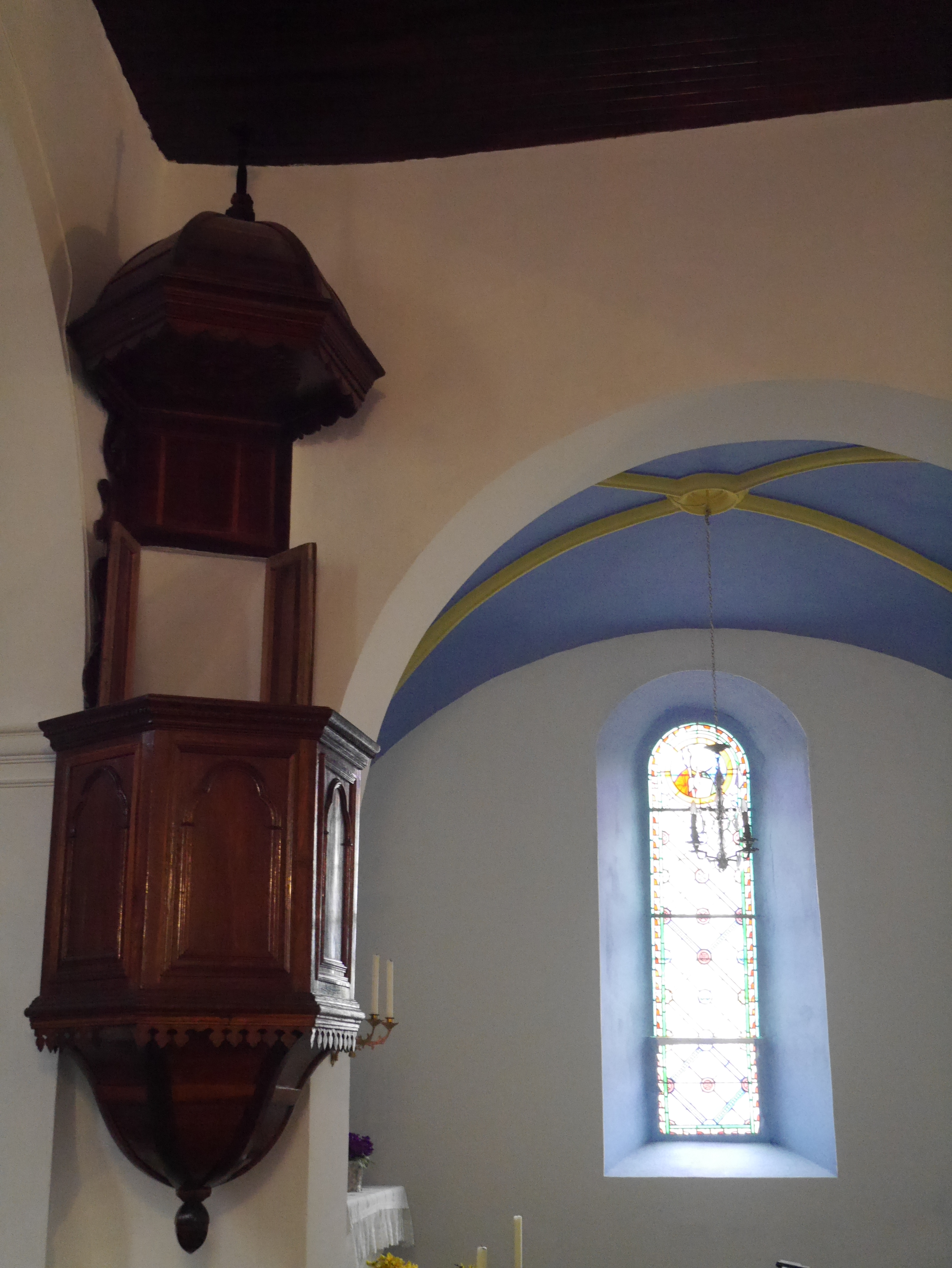 Rénovée depuis décembre 2012, le vitrail est désormais mis en valeur